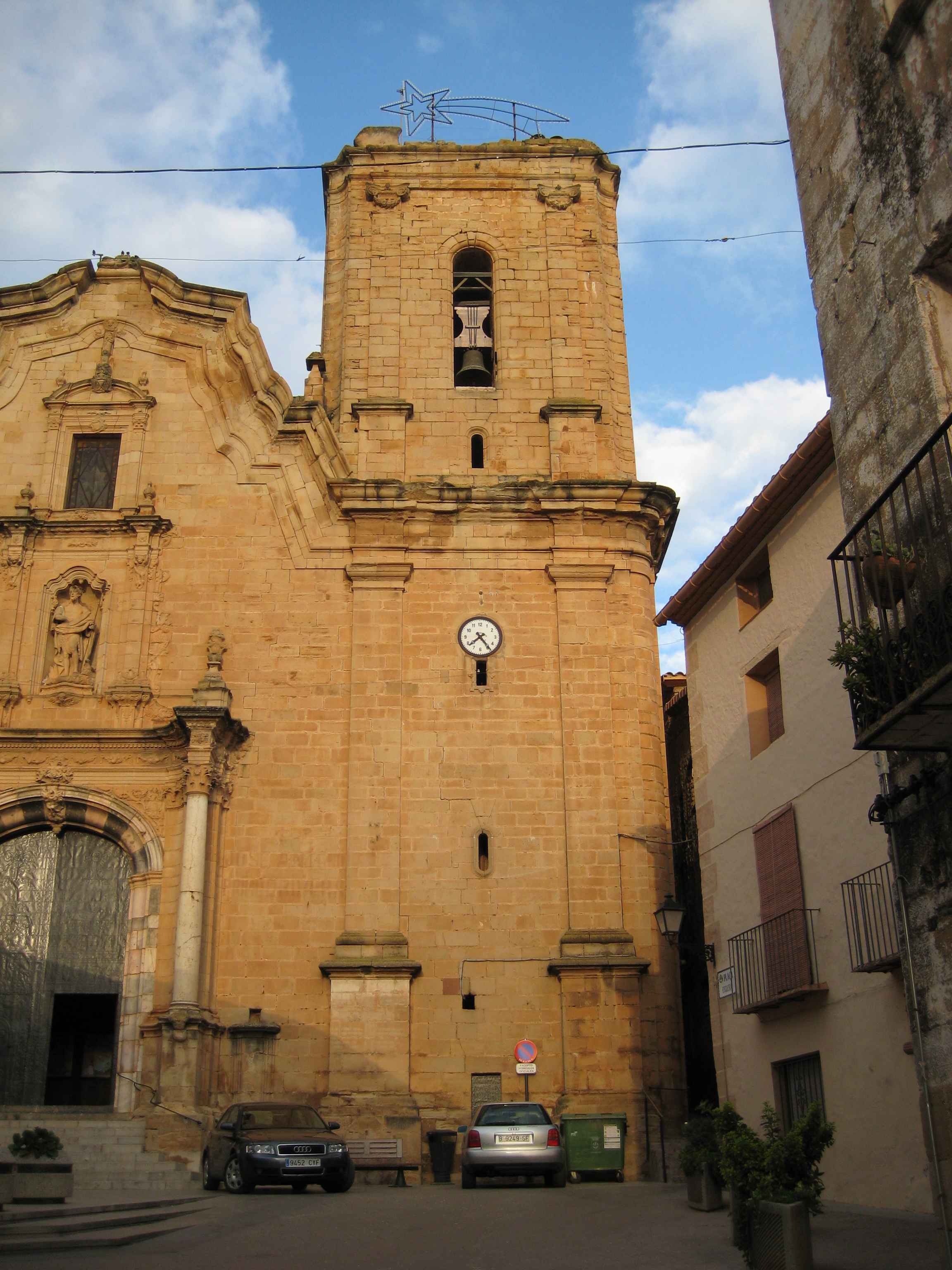 Torre campanar de l'església de Sant Joan Baptista de Cabanes (Plana Alta)